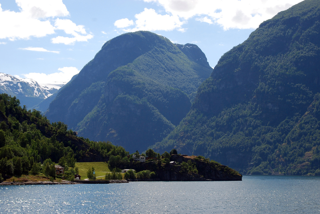 Nærøyfjord in Norway